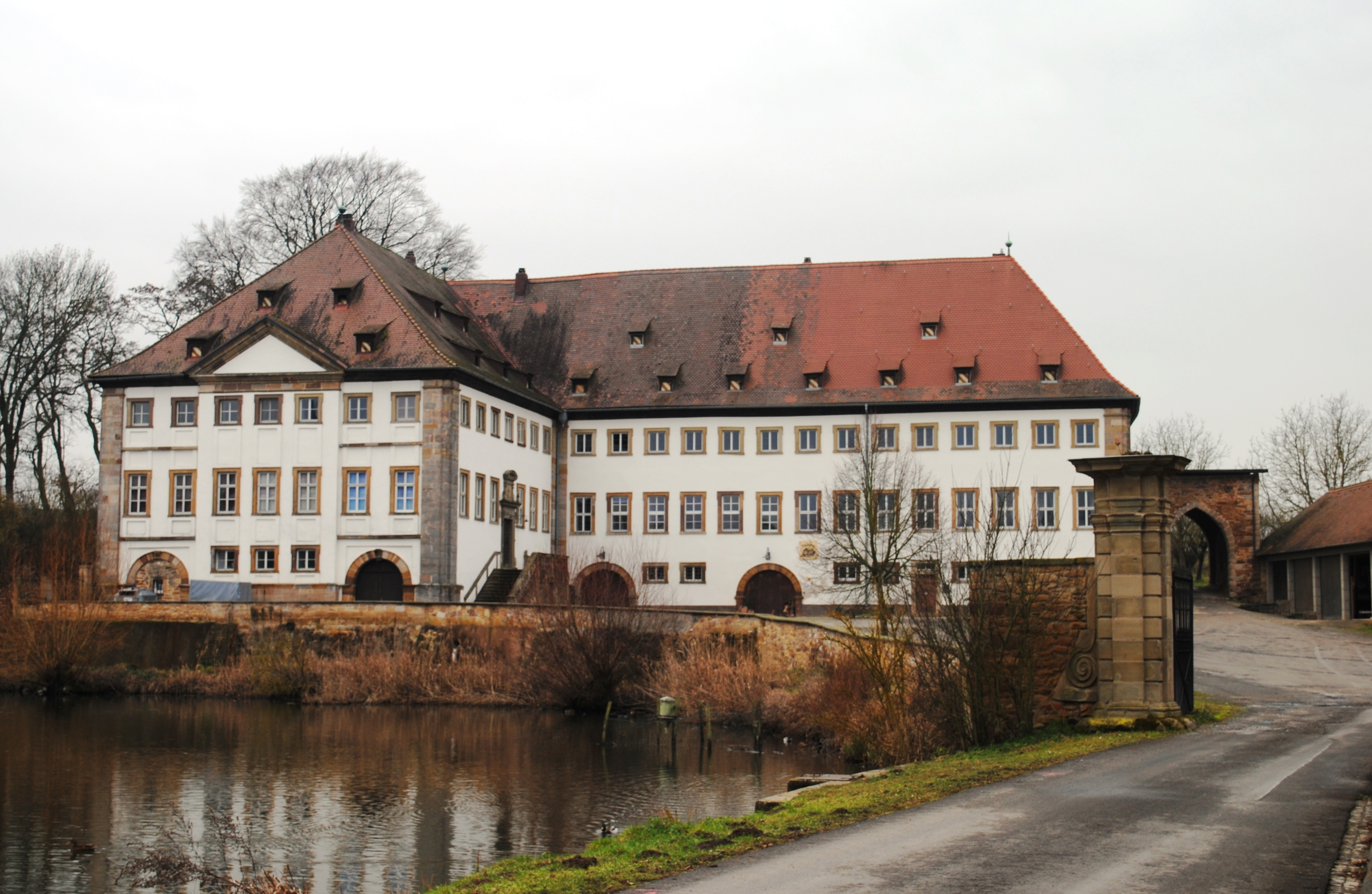 Schlossanlage, Schloss Bimbach, Prichsenstadt-Bimbach